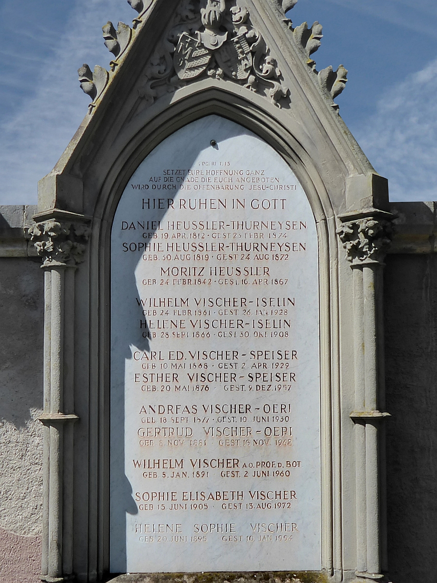 Wilhelm Vischer (1891–1960) a.o Professor der Botanik, u.a Präs. der Schweiz. Botanischen Gesellschaf, Naturschützer. Grab auf dem Friedhof Wolfgottesacker, Basel